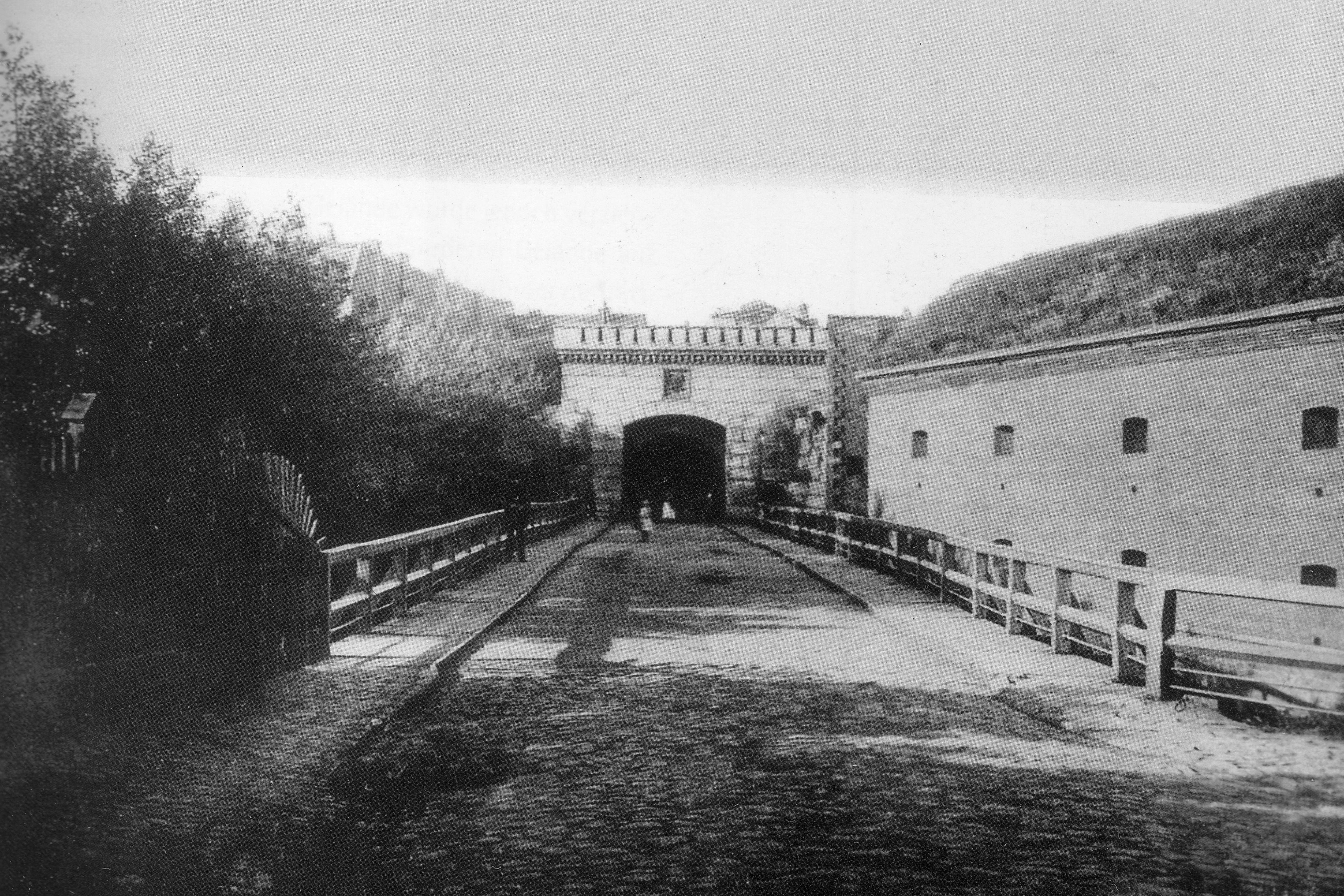 Magdeburg, Außenansicht des Hohepfortetor